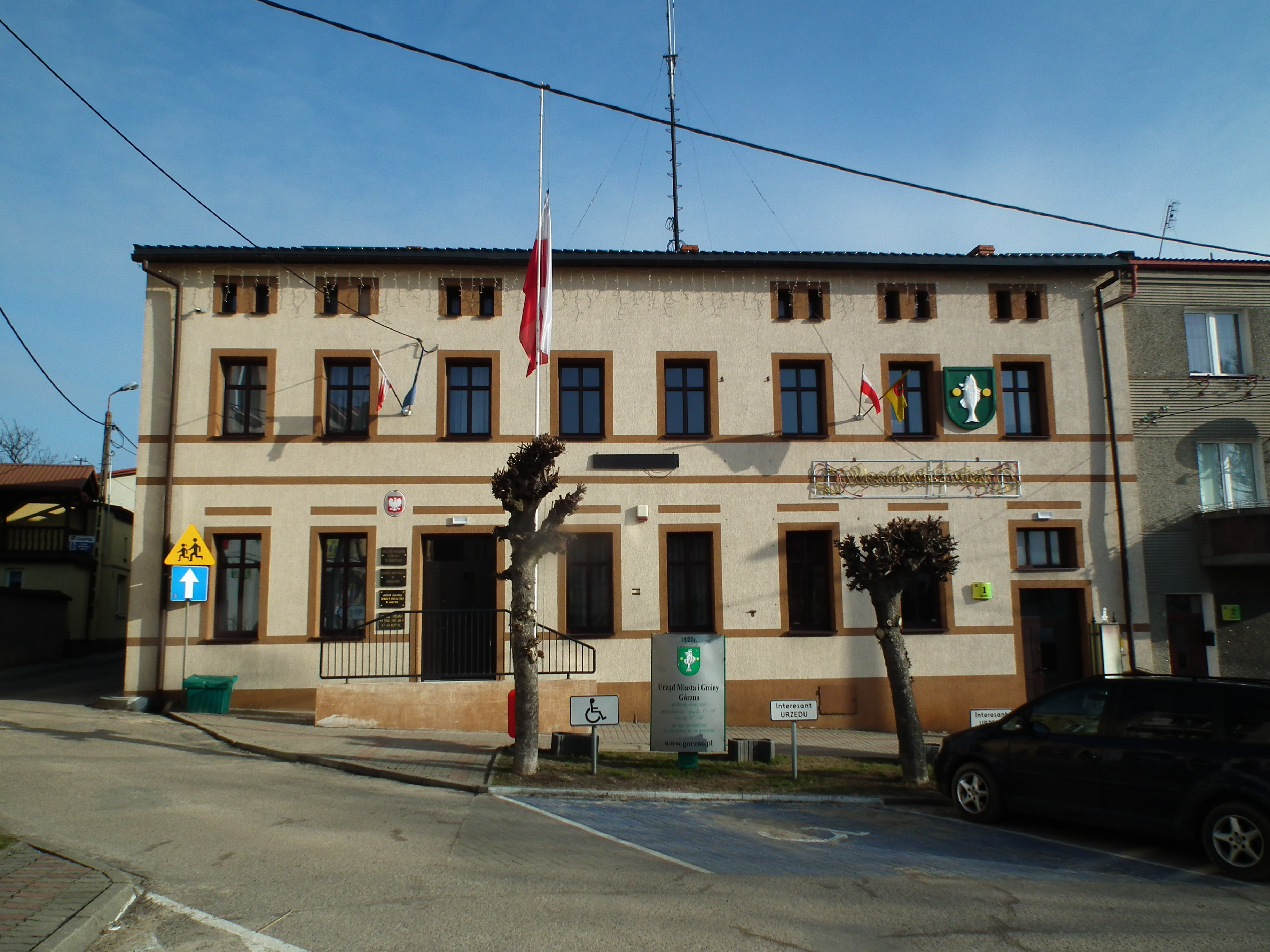 Widok miejski z Górzna.